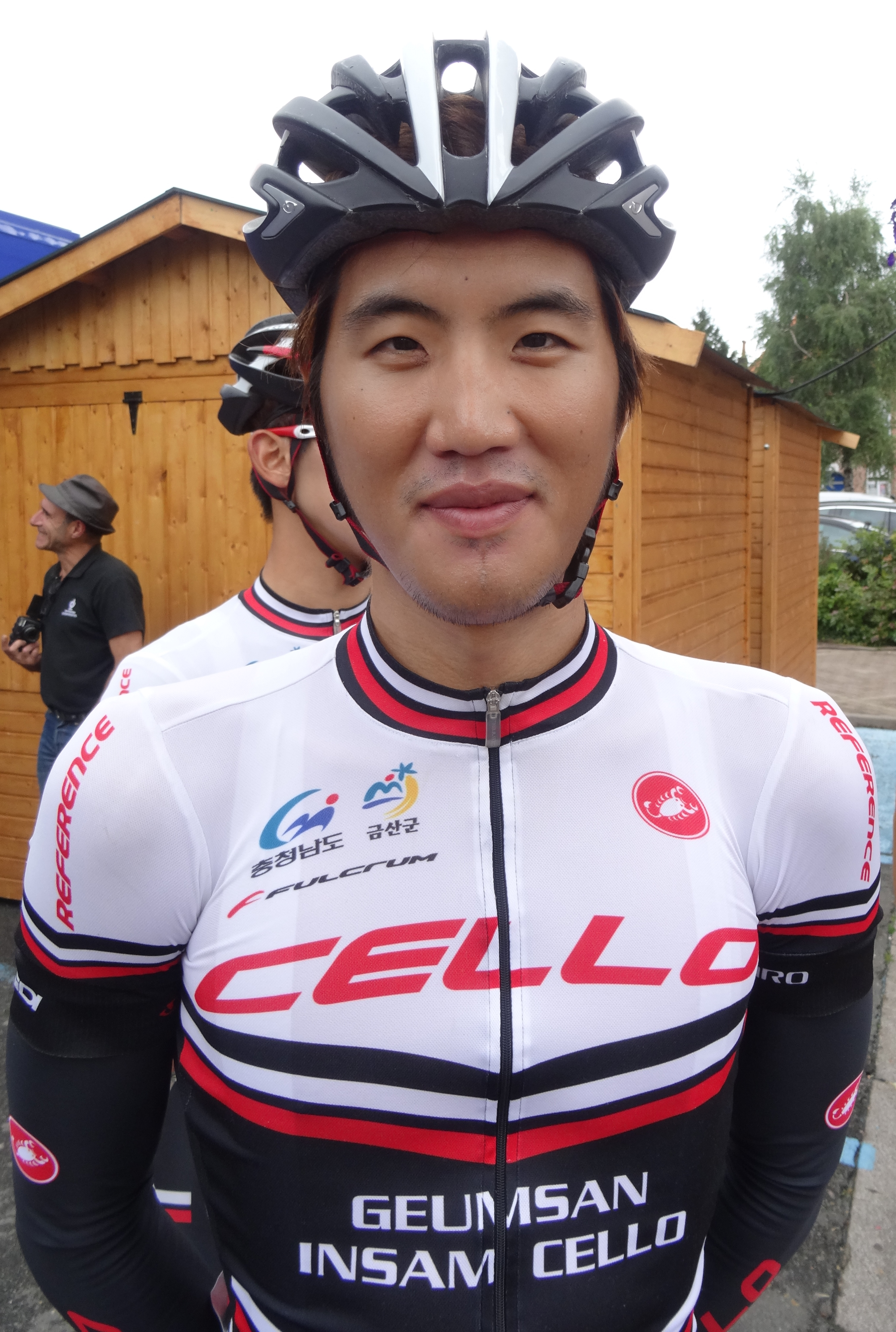 Reportage photographique réalisé le dimanche 13 juillet à l'occasion du départ et de l'arrivée de la Ronde pévéloise 2014 à Pont-à-Marcq, Nord-Pas-de-Calais, France.